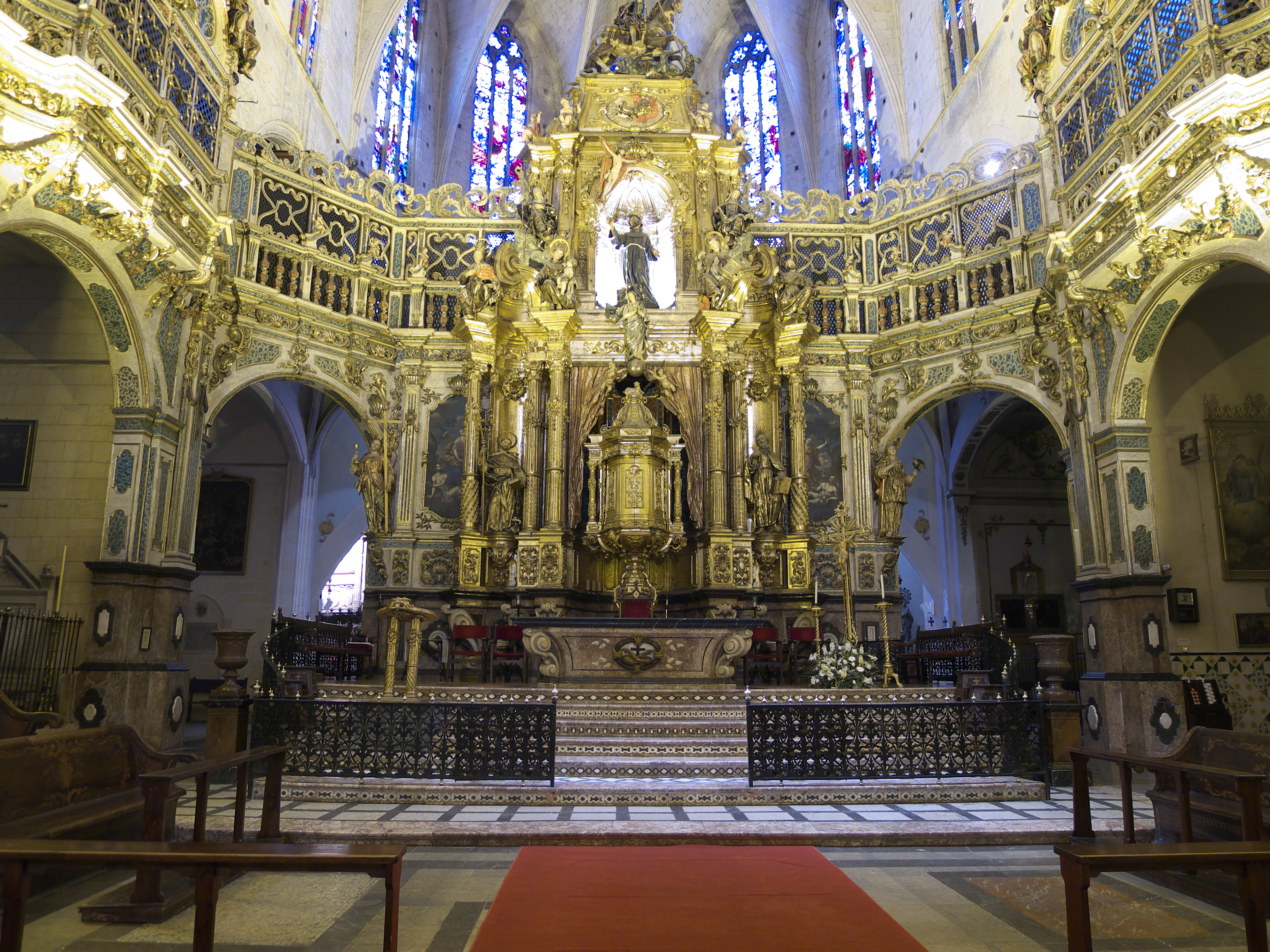 Retablo mayor (1739) de la basílica. Desconozco el autor o autores del proyecto.